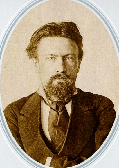 Nikolaj Ivanovič Kibal'čič